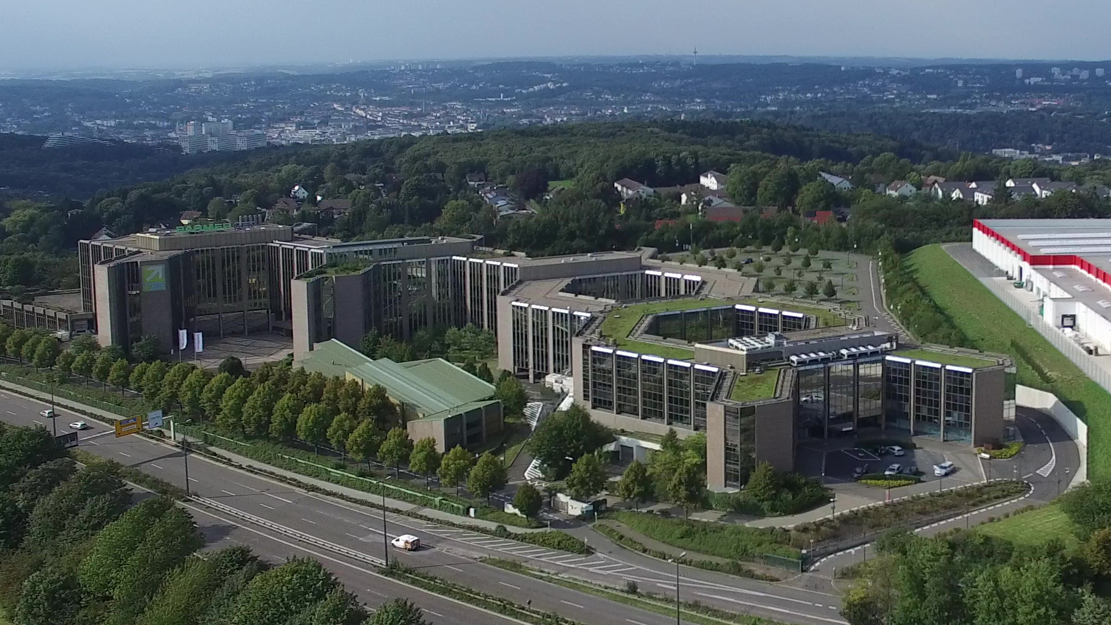 Verwaltungsgebäude der Barmer GEK in Wuppertal-Lichtscheid (ehemalige Hauptverwaltung Barmer Ersatzkasse); Landesstraße 418